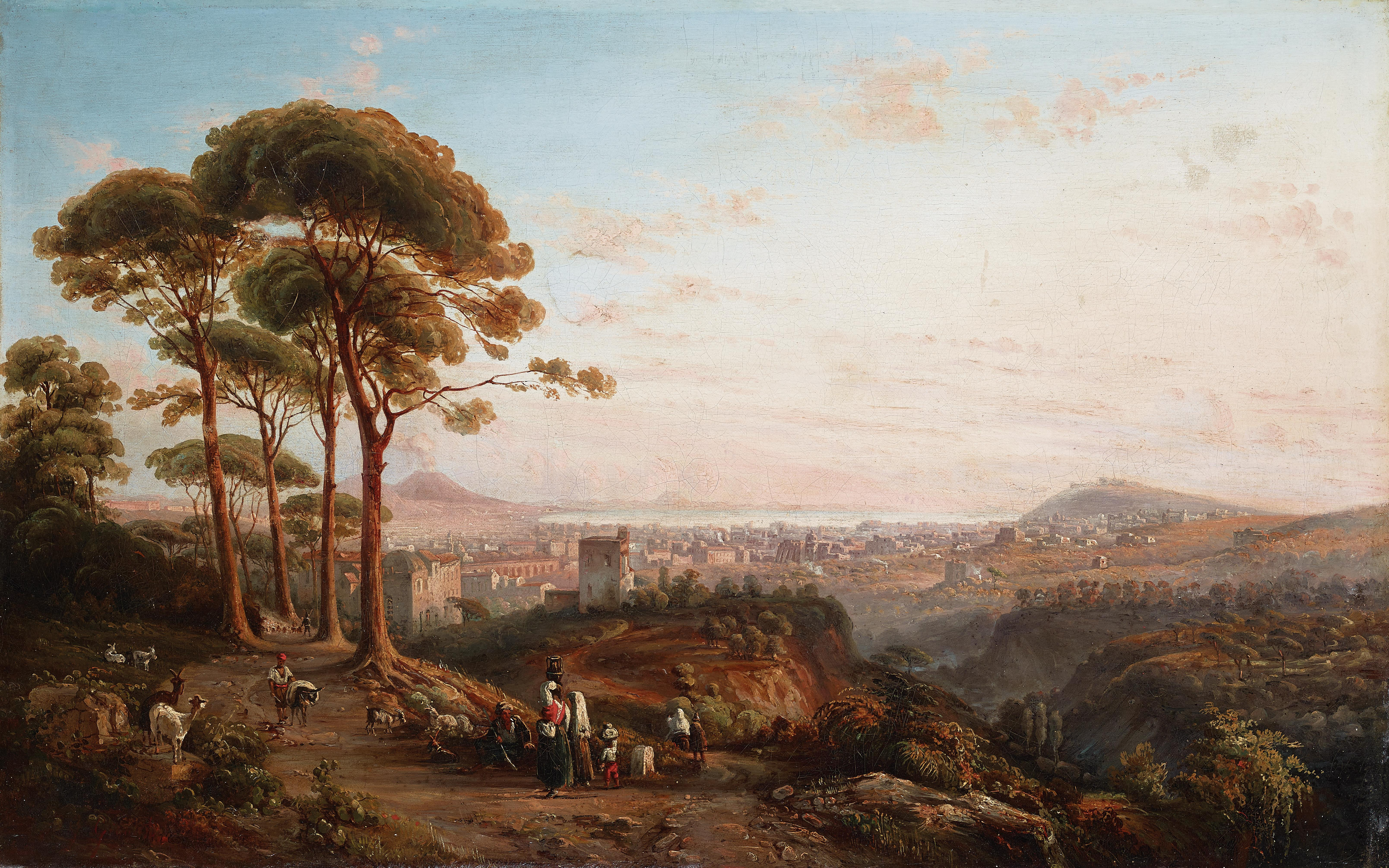 Ansicht von Neapel von La Conocchia aus, signiert G. Gigante, Öl auf Leinwand, 37,5 x 60 cm